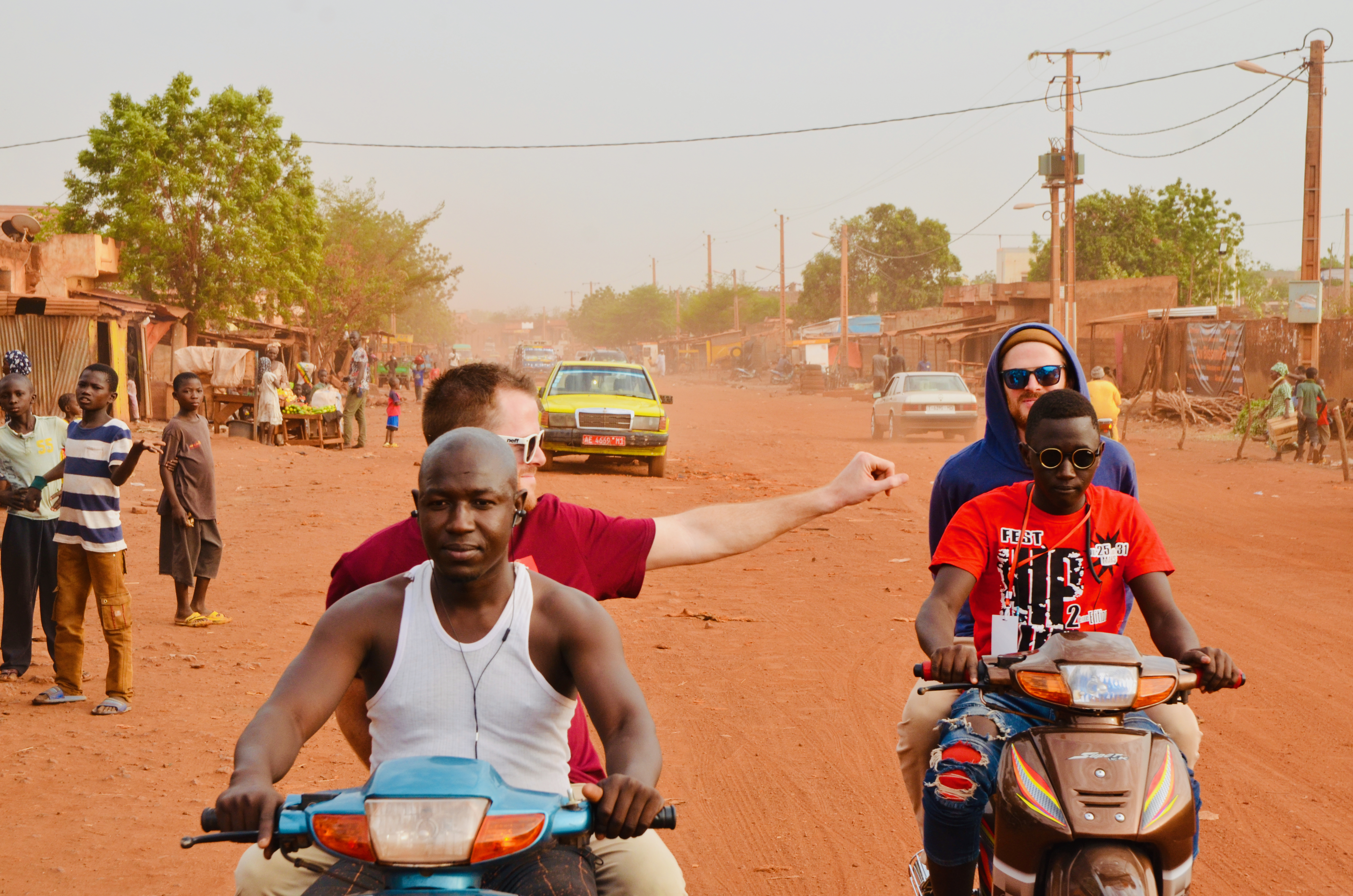 Die HipHop-Musiker Felix und Till Neumann der Band Zweierpasch in Bamako, Mali